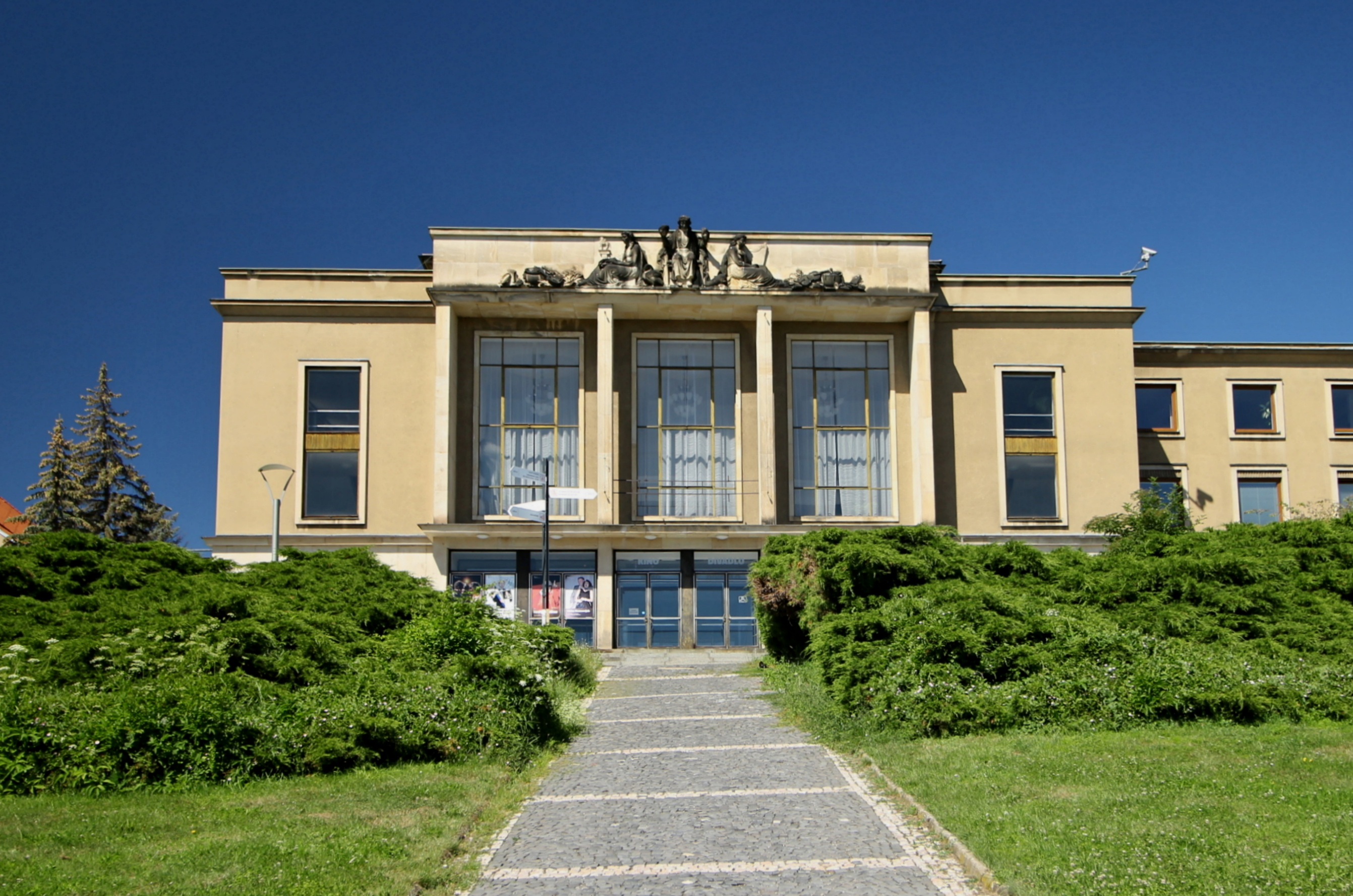 Příbram, Divadlo A. Dvořáka a Hotel Belvedere